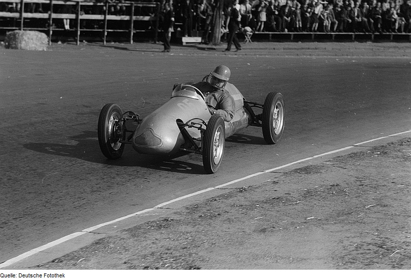 Original image description from the Deutsche Fotothek Automobilrennfahrer in seinem Wagen mit der Nummer 35? beim 6. Leipziger Stadtparkrennen